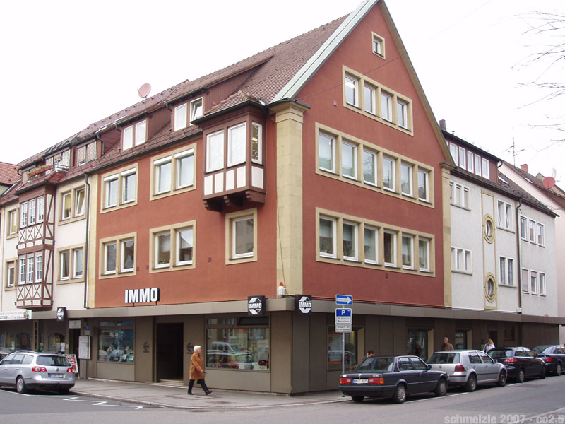 Ehemaliges Gebäude des Möbelhaus Bierstorfer in der Lohtorstraße 23 in Heilbronn, Beispiel für die Wiederaufnahme des Heimatstils zur Zeit des Wiederaufbaus